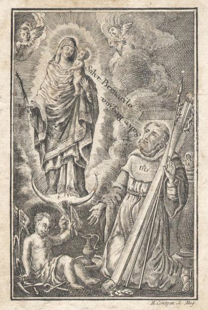 Das (alte) Speyerer Gnadenbild Patrona Spirensis und St. Bernhard, Stich um 1760